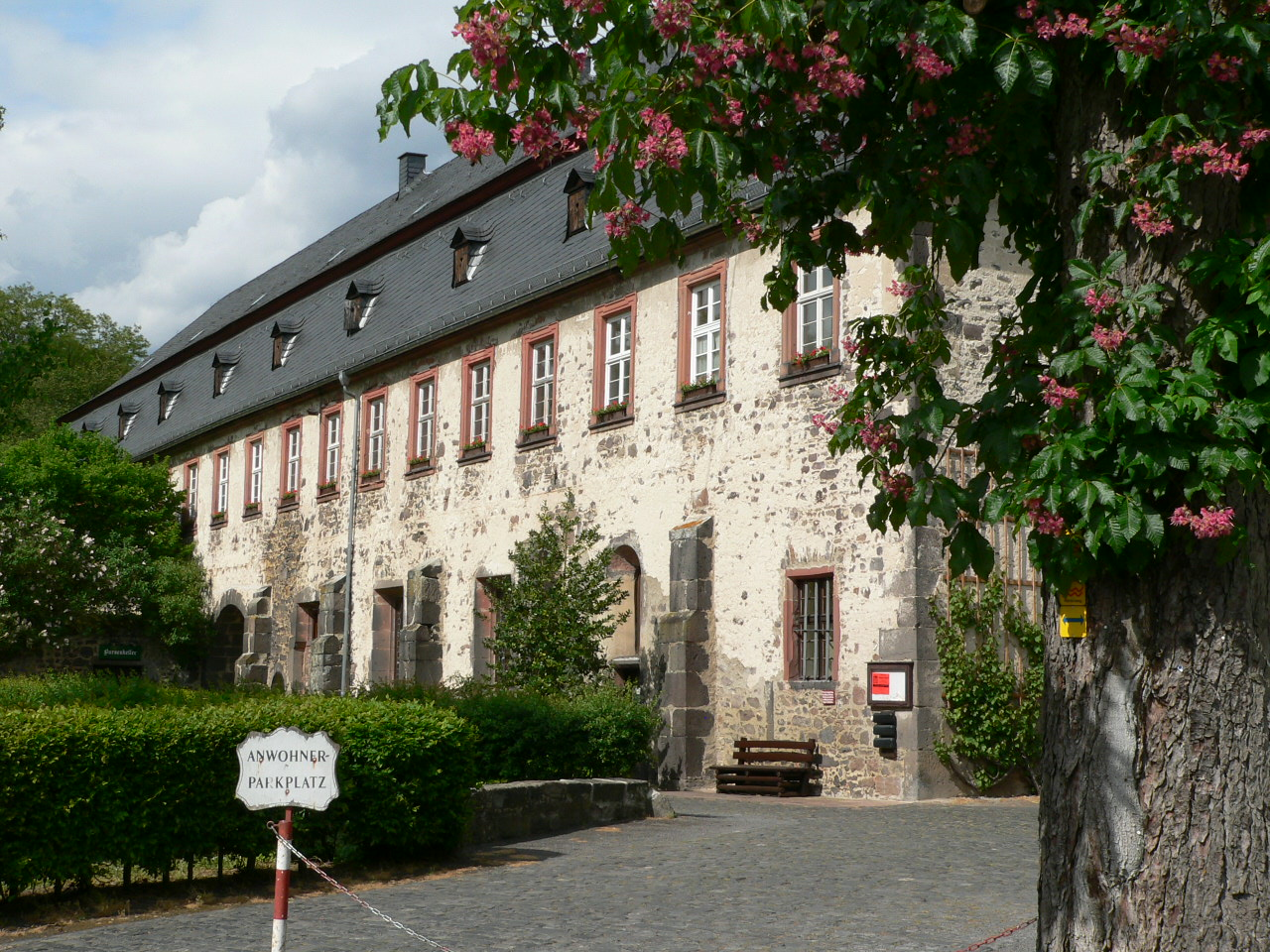 Bursenbau Kloster Arnsburg bei Lich, Hessen, Germany